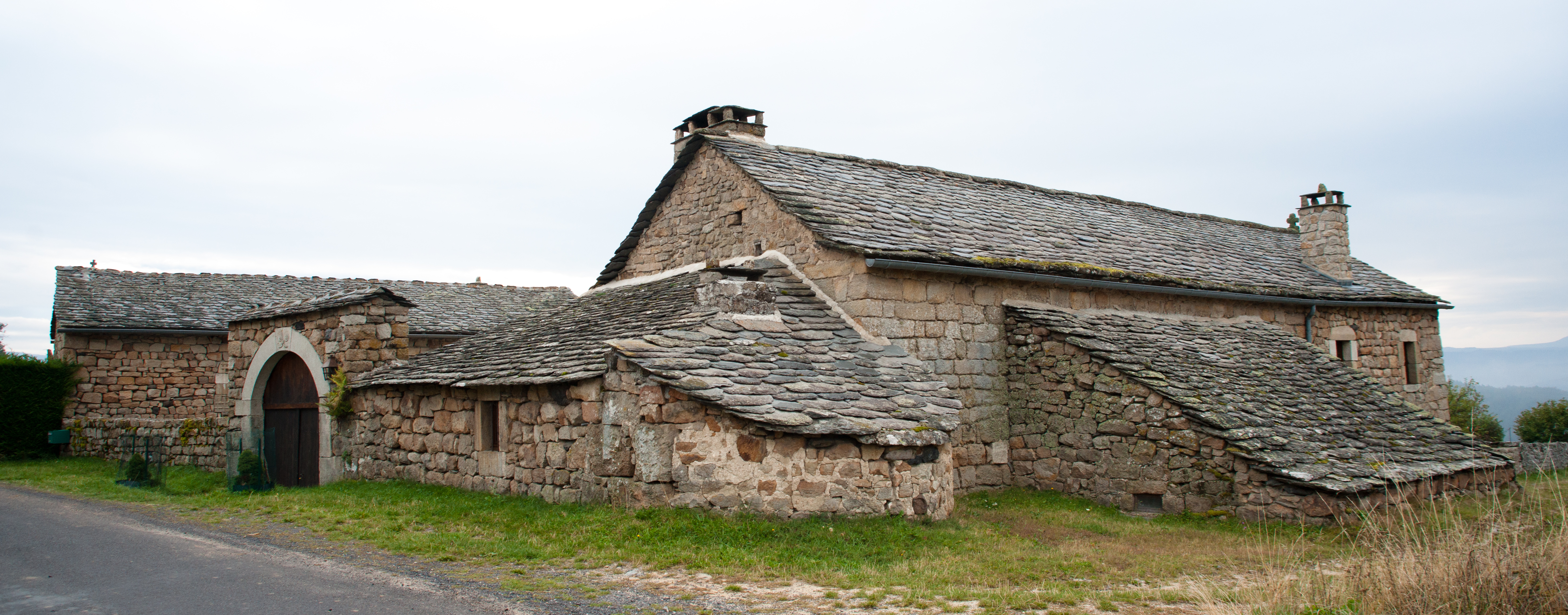 La ferme Paradis la Montjoie de Montferrat à Blavozy (Haute-Loire), France. Monument historique.